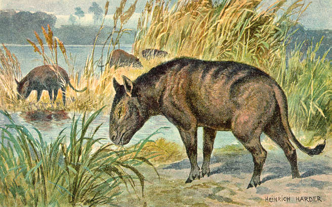 Merycoidodon